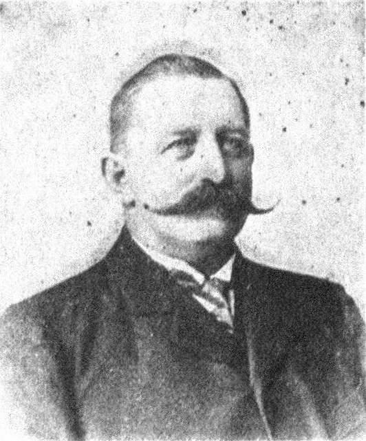 Österreichischer Politiker, Reichsratswahl 1907, Name siehe Dateiname